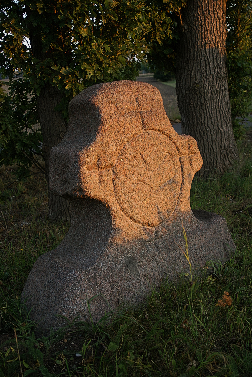 Sühnekreuz an der Abfahrt B 198 Richtung Ellingen